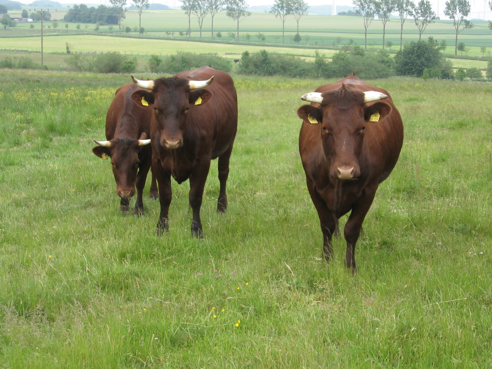 Drei weibliche Hausrinder des Rotes Höhenvieh des Verein für Natur- und Vogelschutz im Hochsauerlandkreis im NSG Hemmeker Bruch bei Brilon-Madfeld.